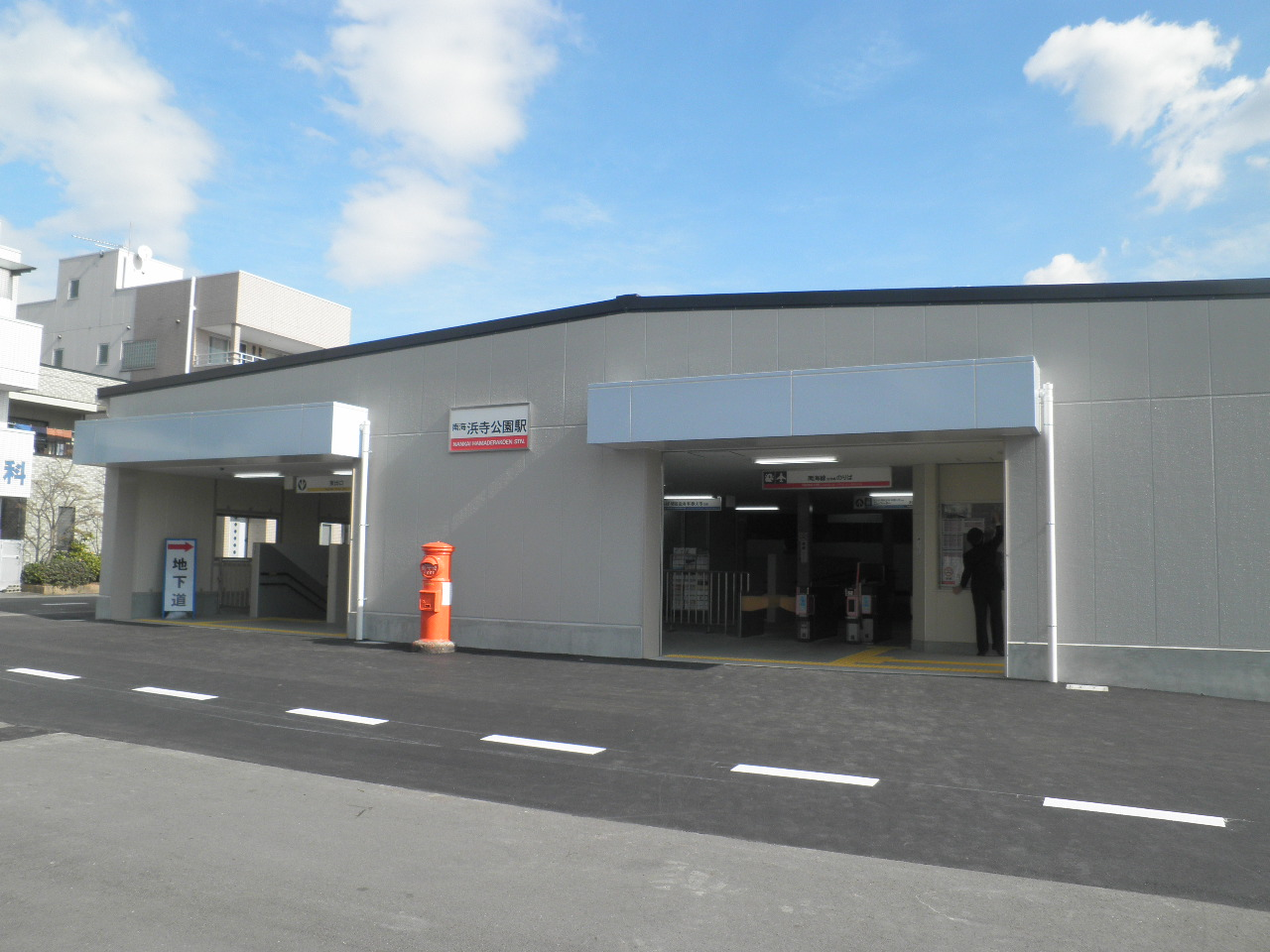 浜寺公園駅仮駅舎